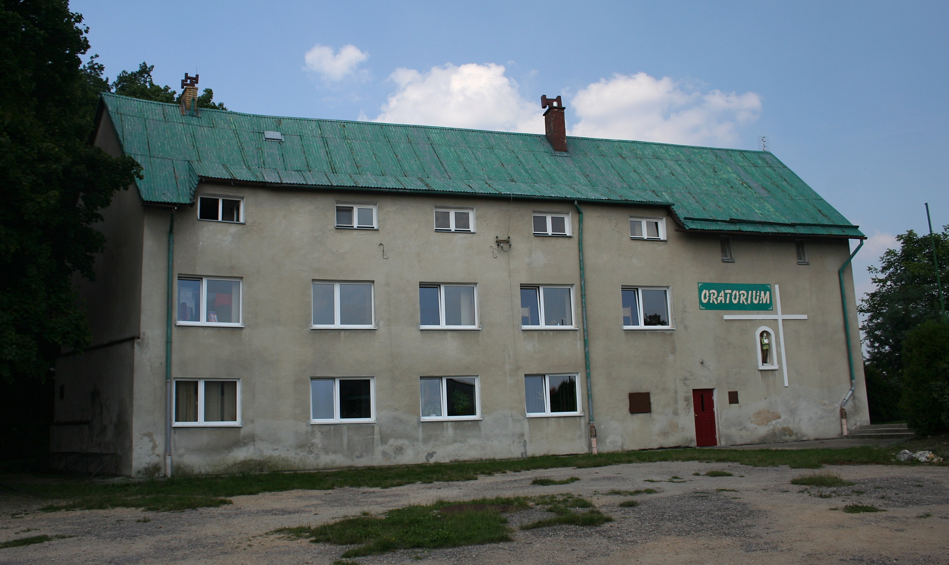 Oratorium salezjanów, Kopiec, gmina Kłobuck, woj. śląskie